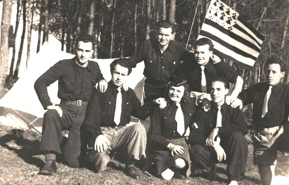 Photographie d'une partie des résistants nationalistes bretons du Groupe Liberté de Saint-Nazaire arborant le Gwenn ha Du